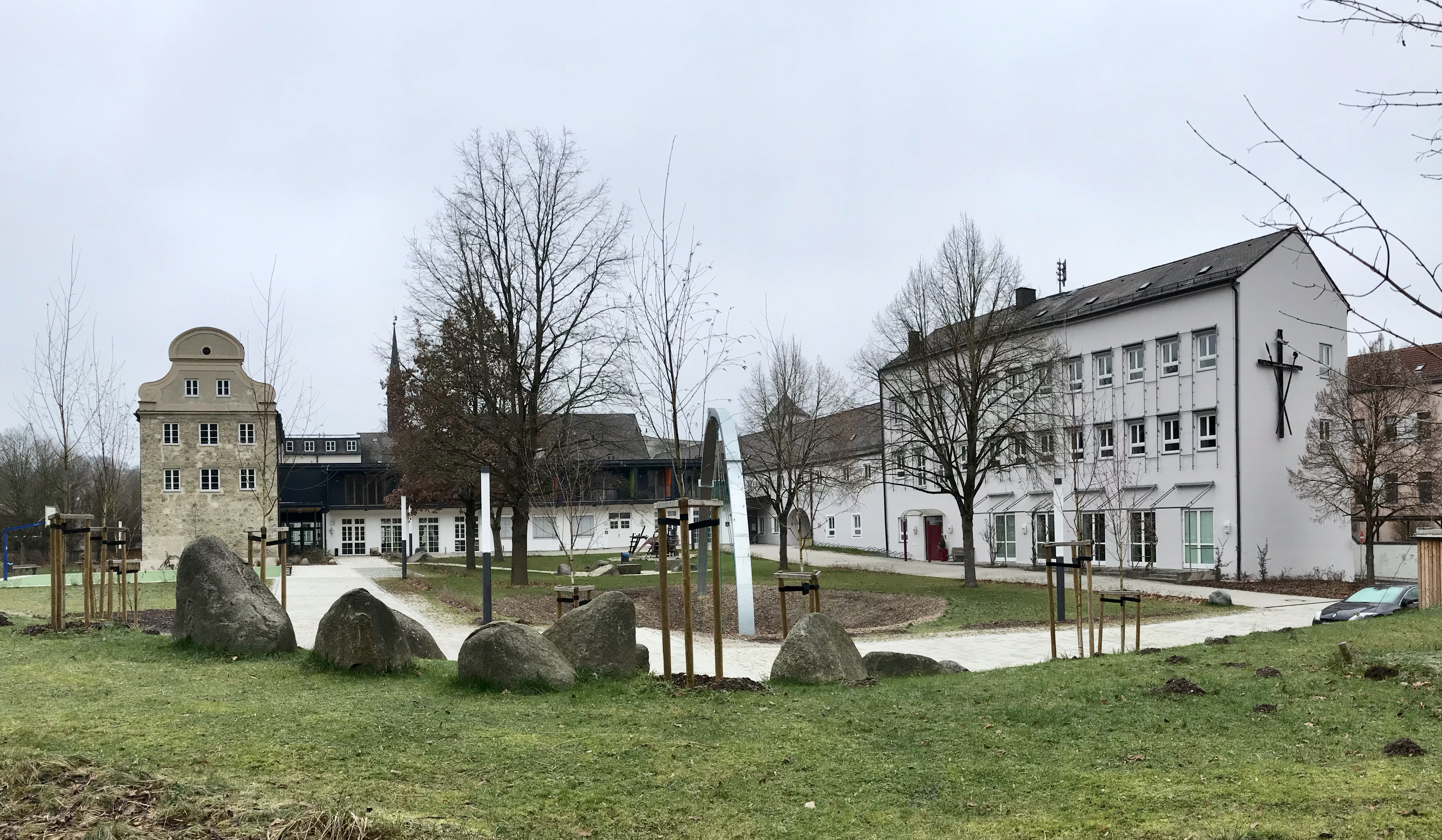 Ehemaliges Kapuzinerkloster St. Anna, Burghausen